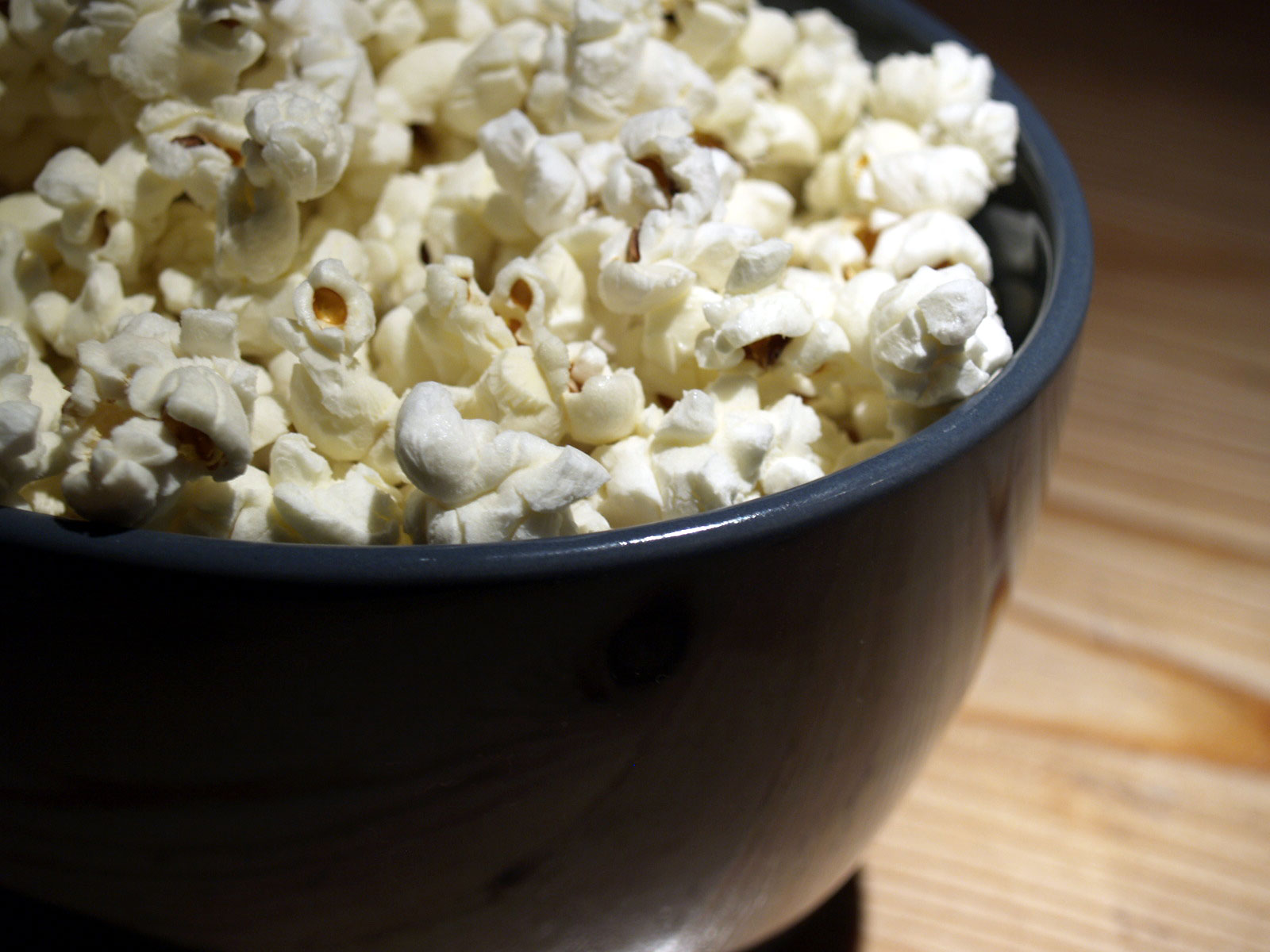 Popcorn